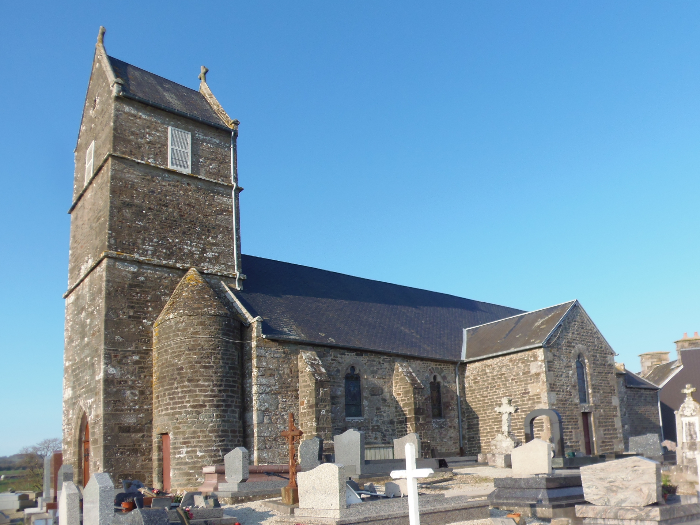 Pont-Farcy (Normandie, France). L'église Saint-Aubin de Pleines-Œuvres.